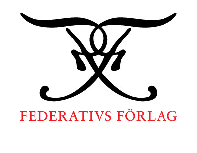 Federativs förlags logga